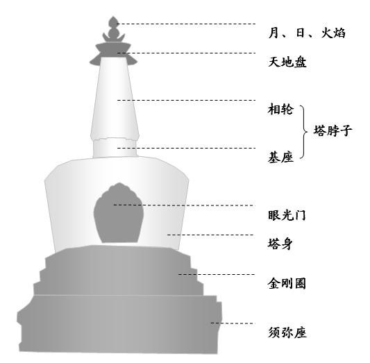 北海白塔各部分标注 绘制